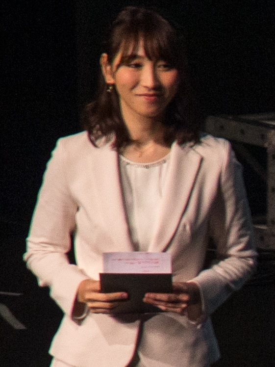 日本レースクイーン大賞2018 渡辺順子